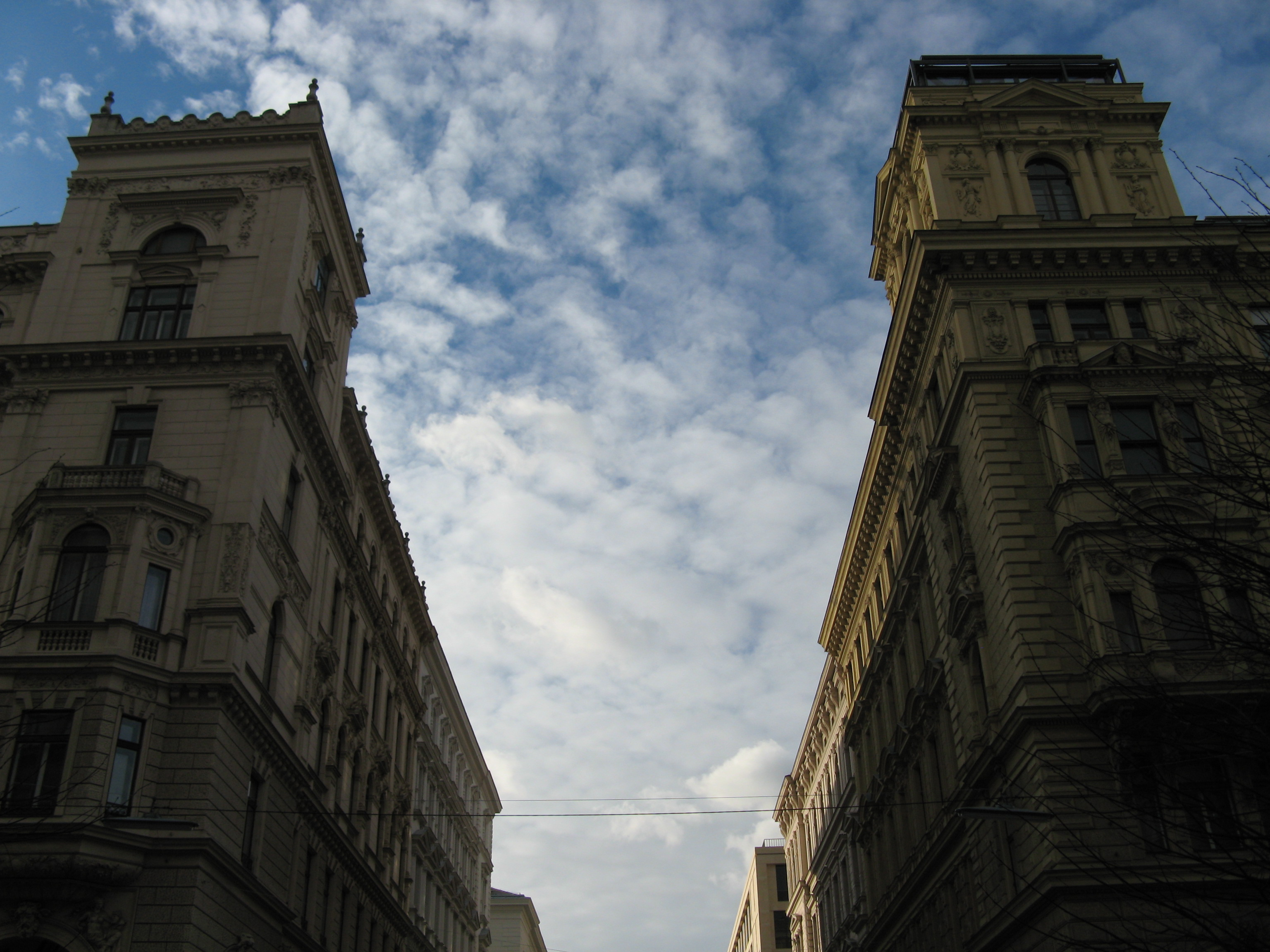 Eckrisalite der Häuser Reichsratsstraße 13 und 15, dazwischen Liebiggasse, Wien-Innere Stadt